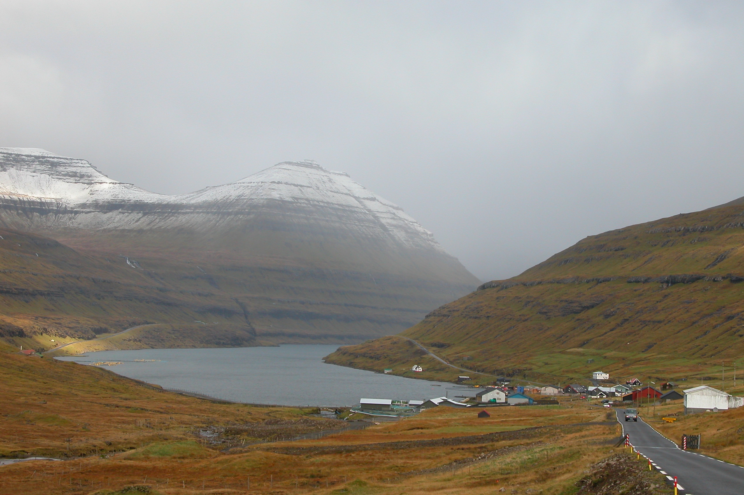 Funningsfjørður, Eysturoy, Faroe Islands.